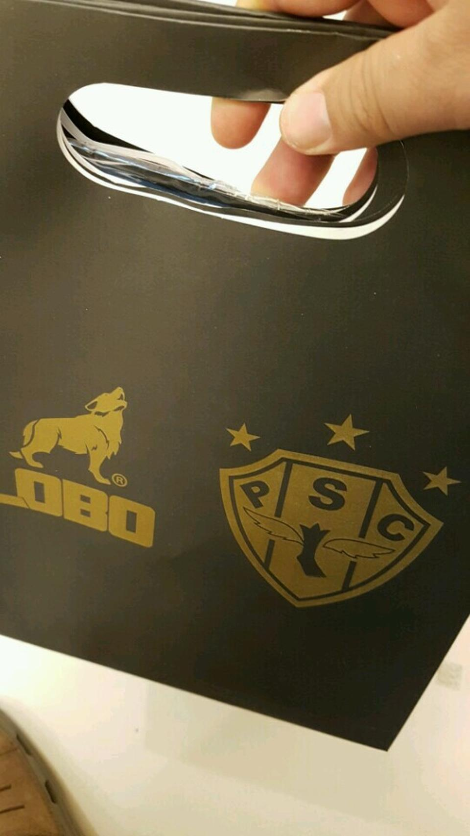 Marca estampada própria do Paysandu